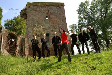 Jacob Reiding is de eigenaar van de Auteursrechten van de foto van de bandleden van Morphia in 2005 (nummer 007844), gemaakt in opdracht van de bandleden van Morphia. Jacob Reiding heeft hierbij toestemming om deze foto zonder tegenprestatie te gebruiken bij een artikel gerelateerd aan Morphia op Wikipedia. Naamsvermelding wordt zeer gewaardeerd.